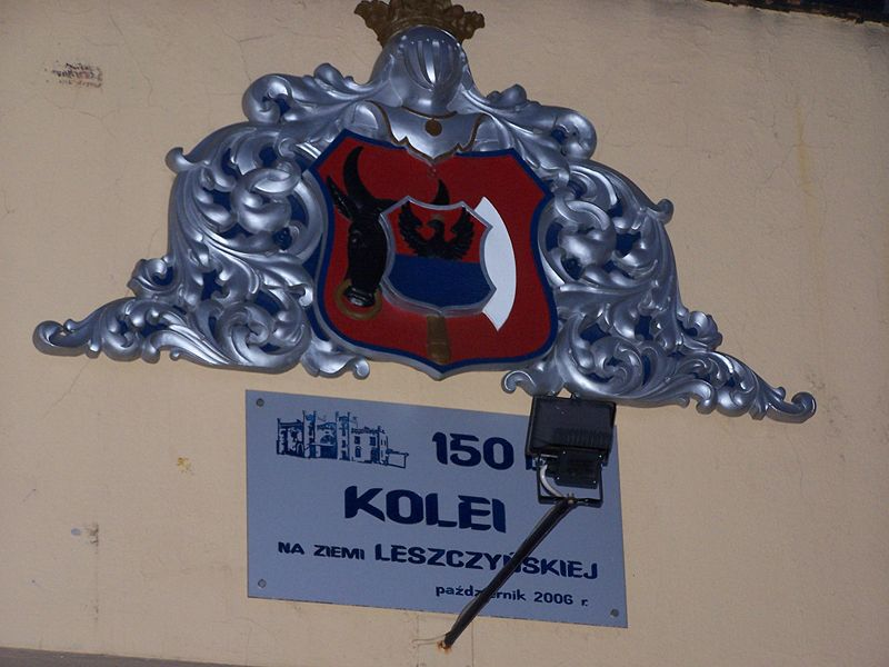 Polska, woj. wielkopolskie, Leszno, herb Leszna, jedyna pozostałość po starym dworcu kolejowym z 1856 r. Obecnie umieszczony na nowym budynku z okazji jubileuszu 150 lecia kolei na ziemi leszczyńskiej